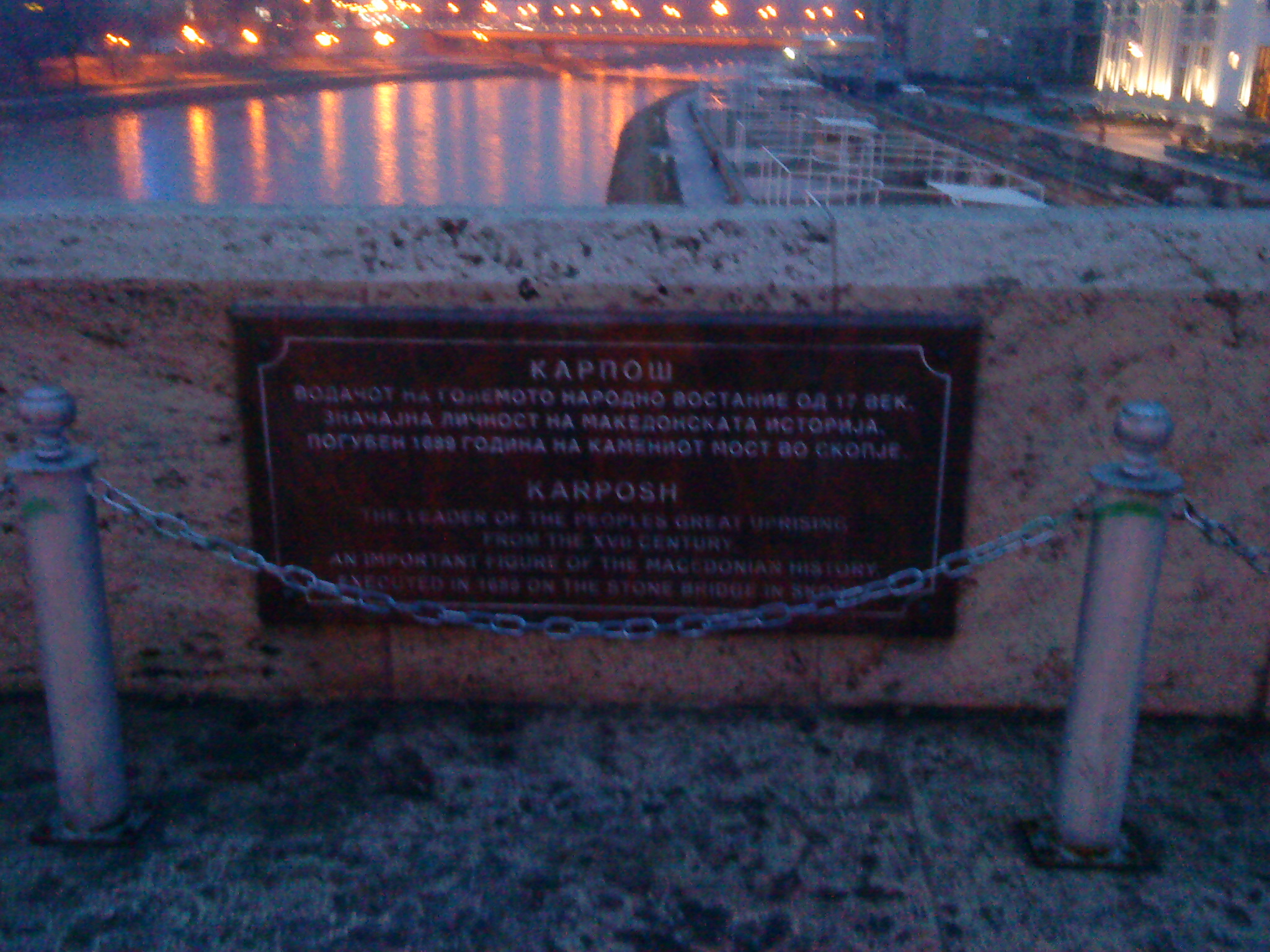 spomen ploča Karpošu, Skoplje